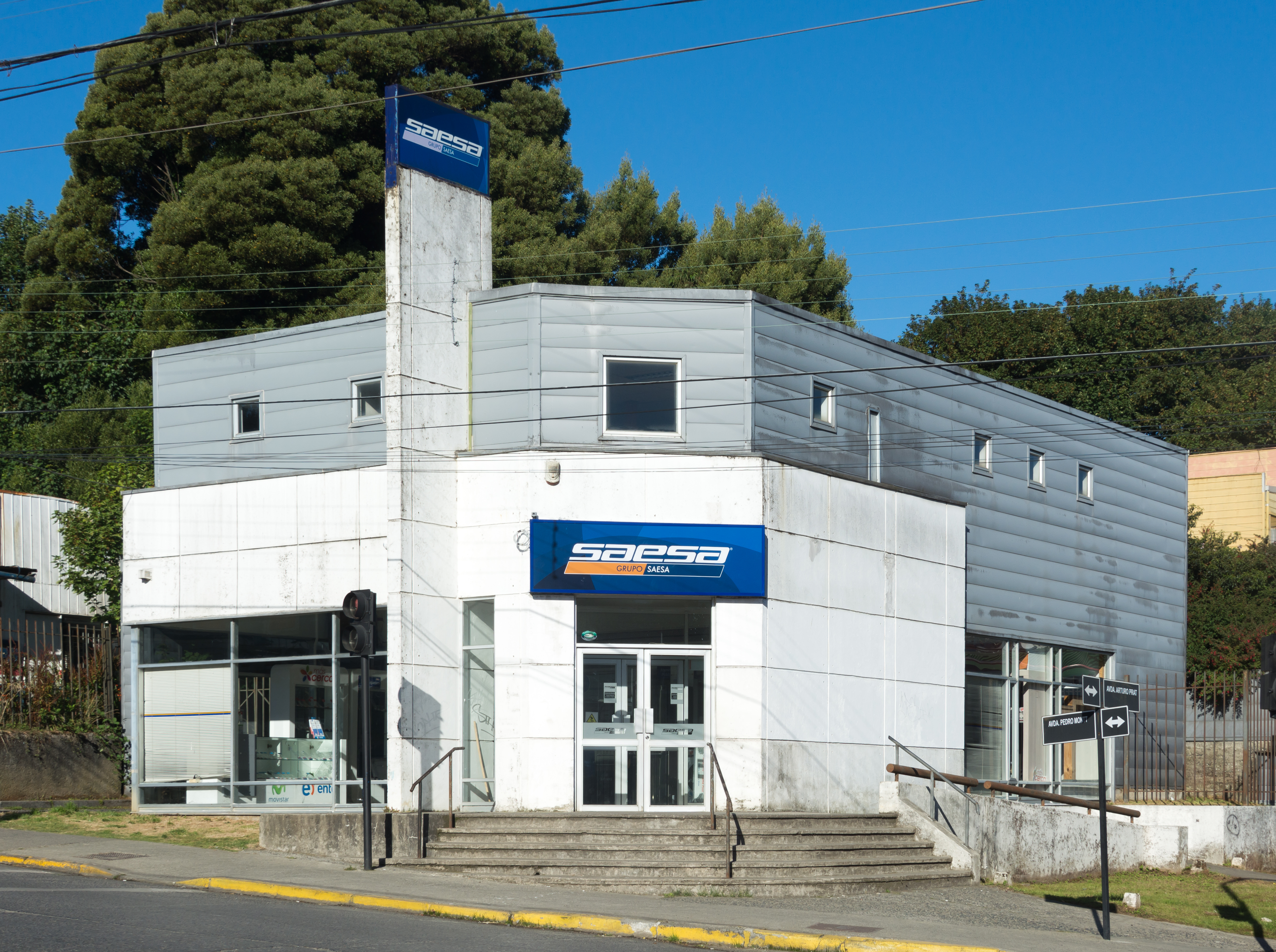 Oficina Saesa, Ancud, Región de Los Lagos, Chile.